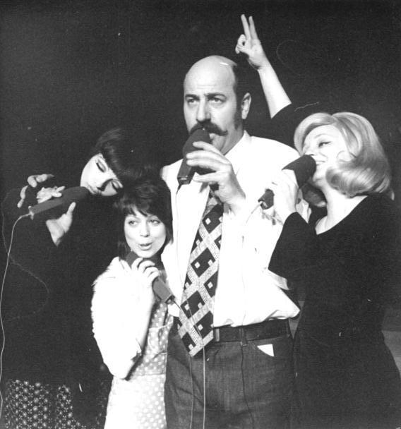 Title: Berlin, Friedrichstadt-Palast, "Guten Abend!" People in the image: Krug, Manfred (Schauspieler, Sänger), Bundesrepublik Deutschland (GND 118890948) Hagen, Nina (Schauspielerin, Sängerin), Bundesrepublik Deutschland (GND 11854473X) Factual corrections and alternative descriptions are encouraged separately from the original description. Additionally errors can be reported at this page to inform the Bundesarchiv. Original historic description: ADN-ZB-Franke-9.4.76-pe-Berlin: "Guten Abend !" sagen Nina Hagen, Magdi Body (UVR), Manfred Krug und Tatjana Archipowa (UdSSR) - v.l.n.r. - im neuen, gleichnamigen Programm des Friedrichstadt-Palastes, das vom 8.4. bis zum 29.5.76 gezeigt wird. (siehe 13 N) [Sperrvermerk: Hagen Nina Republik verlassen 28.12.76]"